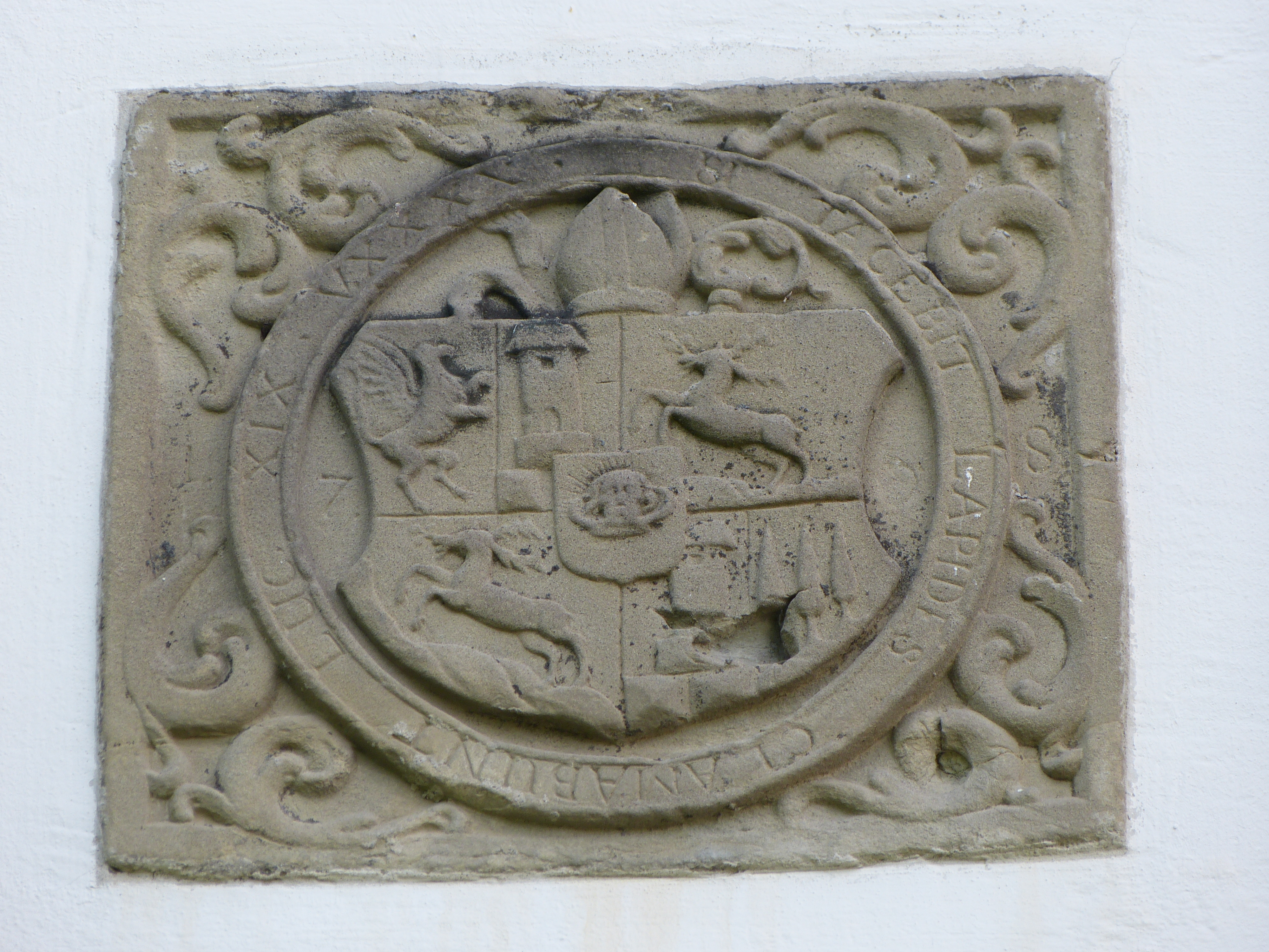 Pfarrhof, Siebnach bei Ettringen, Landkreis Unterallgäu, Bayern, Deutschland. In die Wand eingelassenes Sandsteinrelief mit dem Wappen des Abtes Marianus Biechele († 1708) vom Kloster Steingaden. Inschrift: SI TACEBIT LAPEDIS CLAMABUNT LVC. XIX V. XXXX (dt.: Wo er wird schweigen, da werden die Steine schreien.)